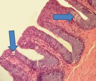 Celulas caliciformes, traquea de avestruz